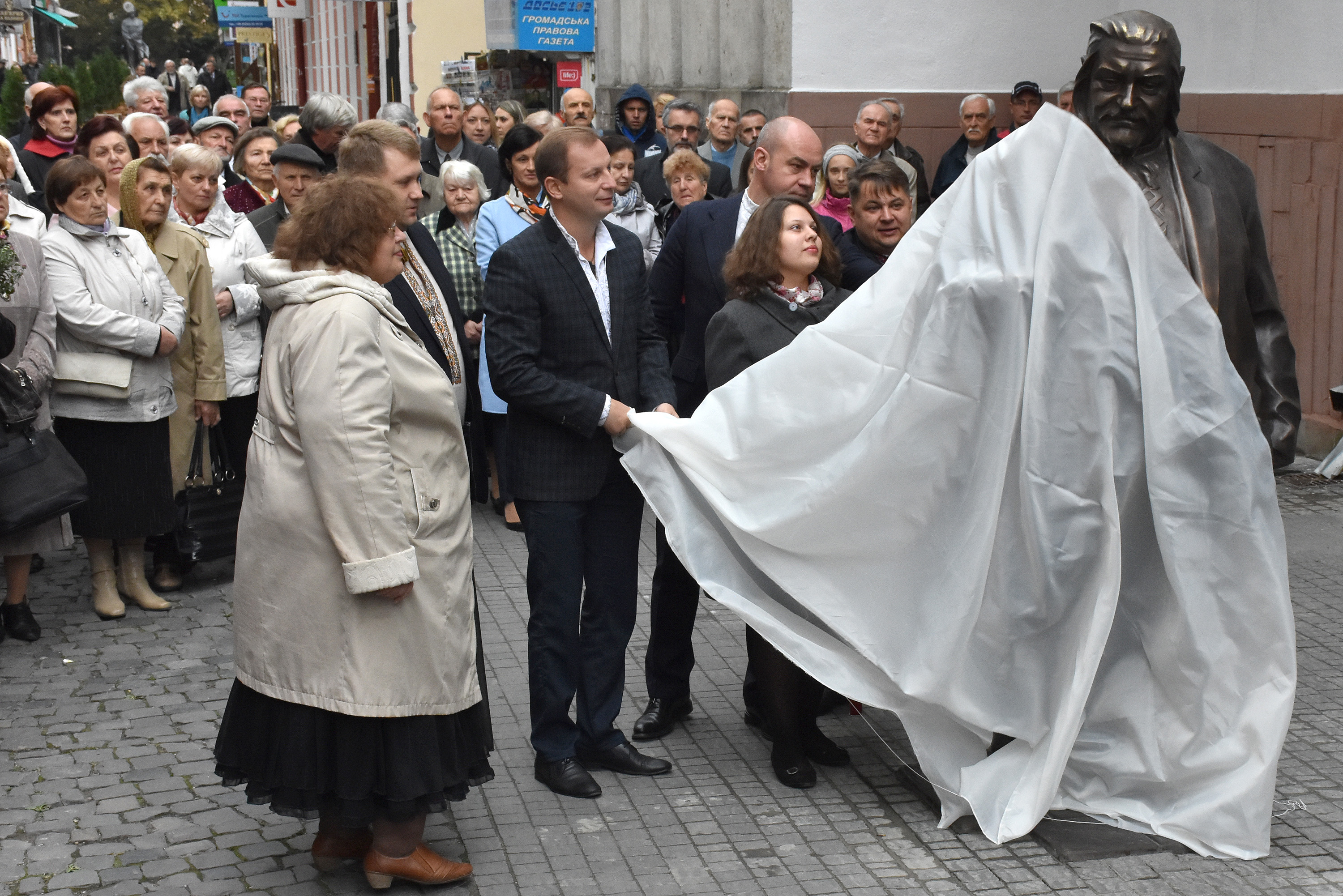 Відкриття пам'ятника українському археологу, мистецтвознавцю, історику, поету, викладачу і громадсько-політичному діячеві Ігорю Ґереті на вулиці Валовій у Тернополі. Полотно з пам'ятника знімають дочка та внучка Ігоря Ґерети Ярина та Оля, голова Тернопільської ОДА Степан Барна, голови Тернопільської обласної та міської ради Віктор Овчарук та Сергій Надал, секретар міської ради Віктор Шумада.